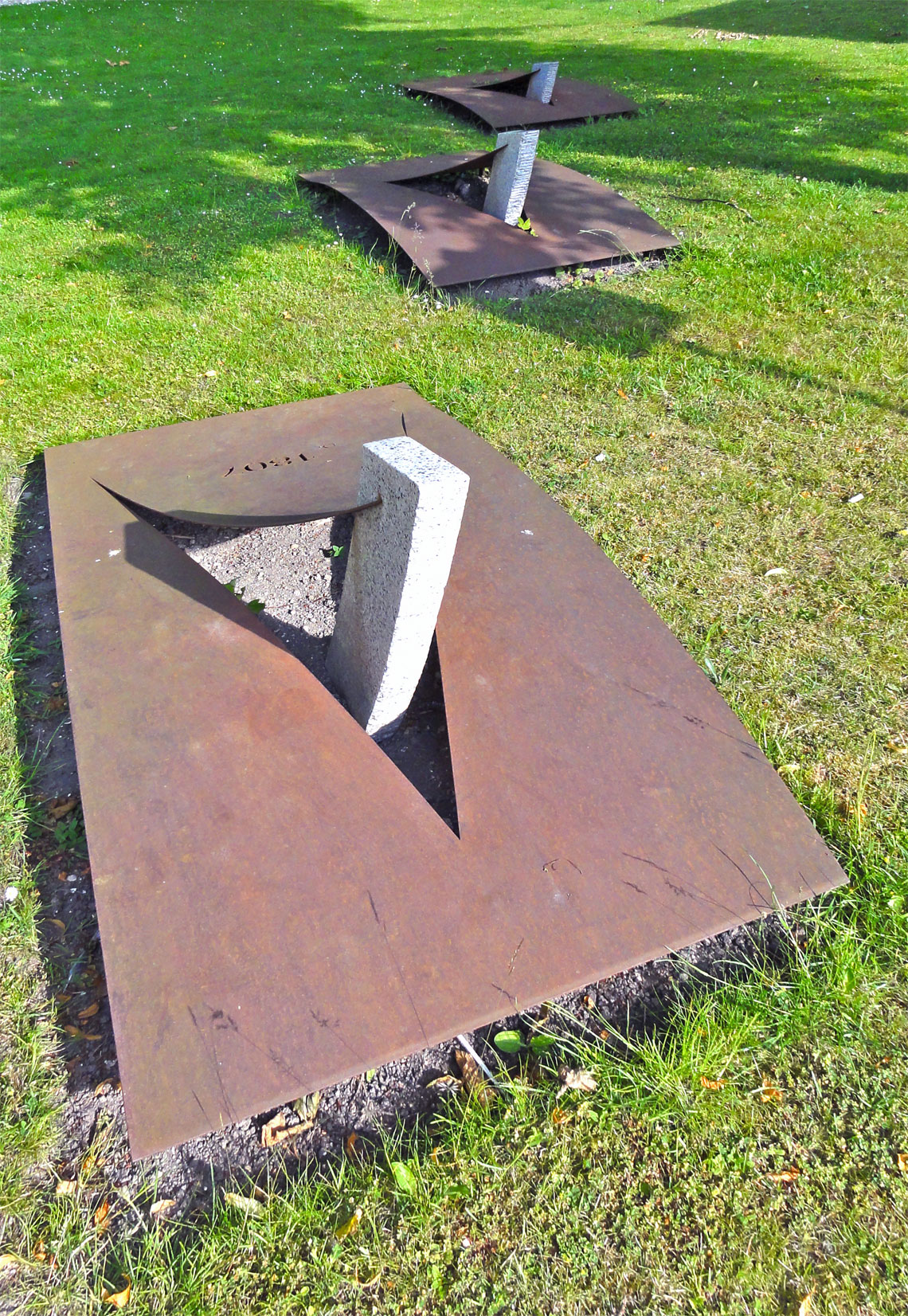 Drenkelingenmonument door Marco Goldenbeld op het terrein van de Groate Kerk in Sint-Jacobiparochie